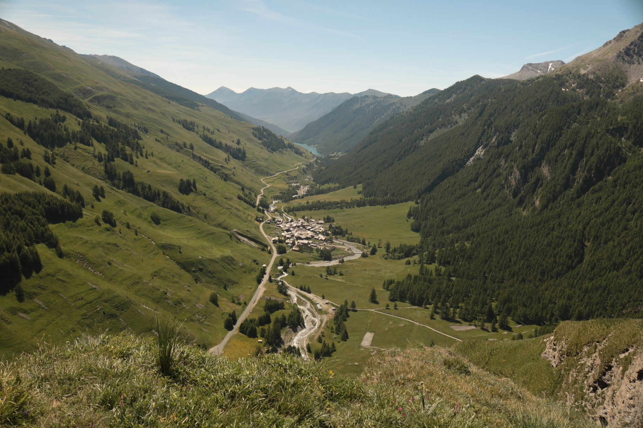 Village de Chianale sur la commune de Pontechianale et son lac (Cuneo - Piémont - Italie)